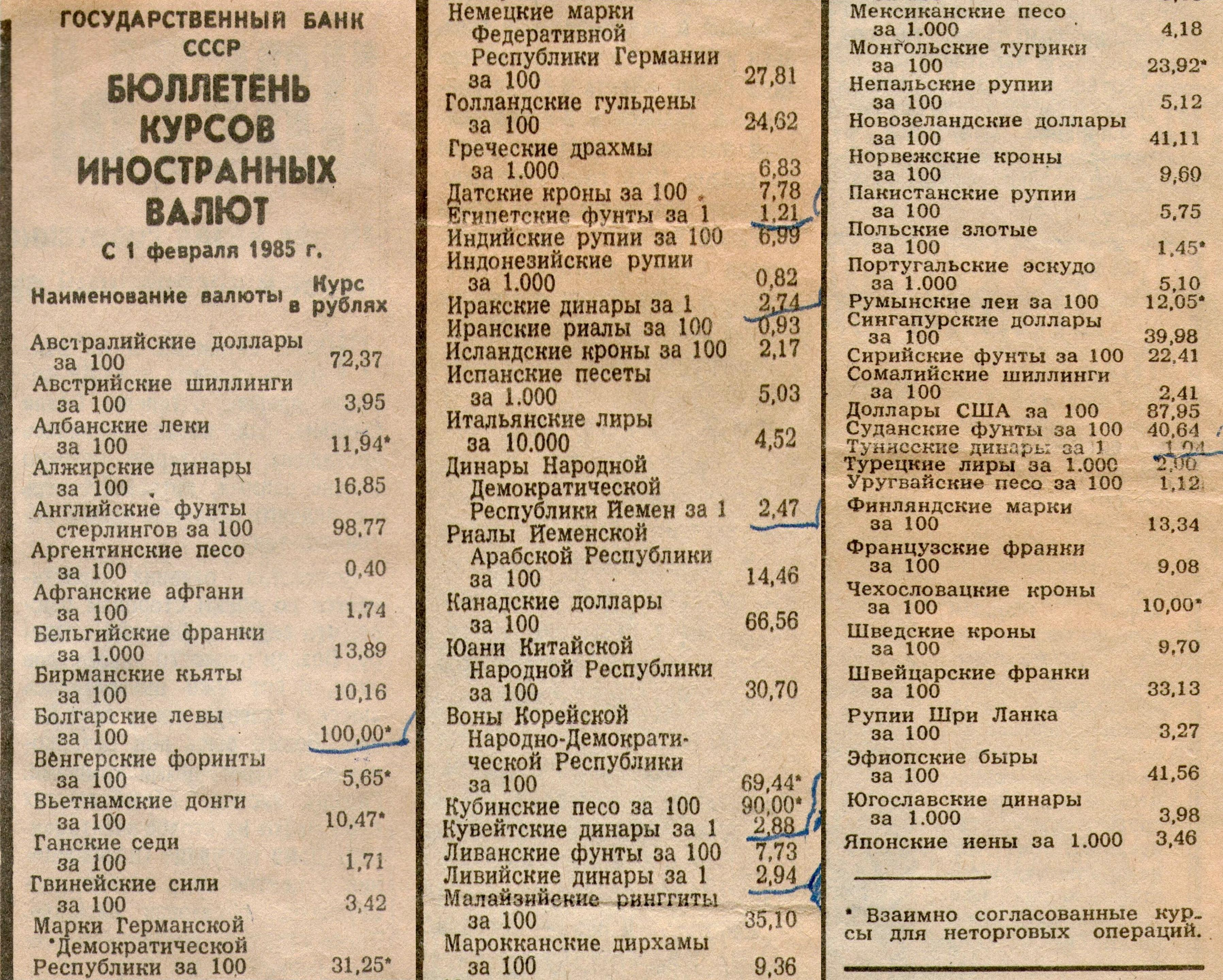 Курс валют Госбанка СССР - 1.02.1985. Был опубликован в газете "Известия".